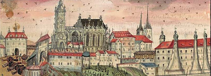 Pražský hrad na vzobrazení v deníku Jindřicha Hýzrle z Chodů z první poloviny 17. století.